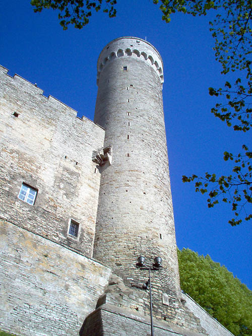 Pikk Hermann Tallinnas.